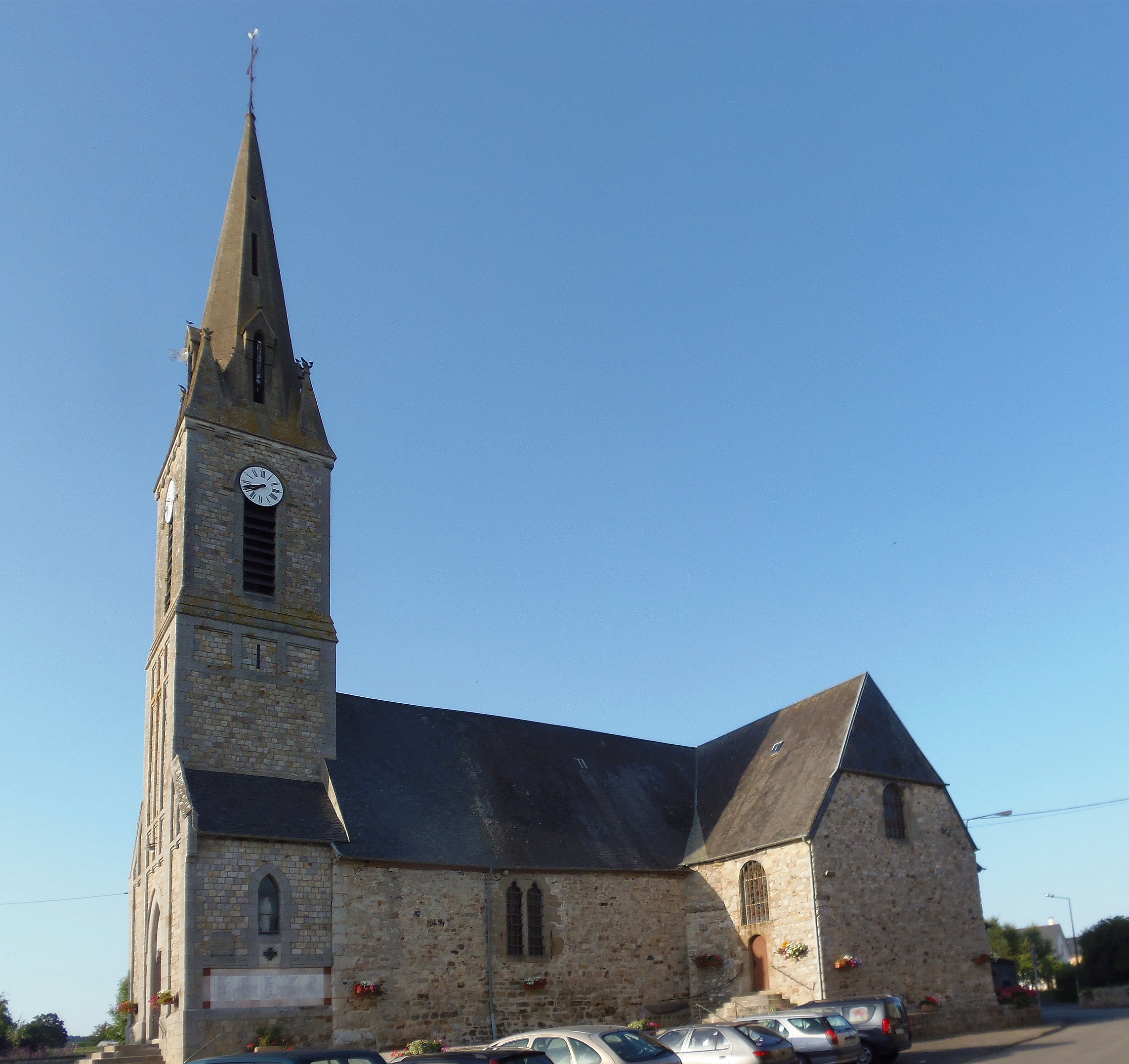 Saint-Georges-de-Rouelley (Normandie, France). L'église Saint-Georges.